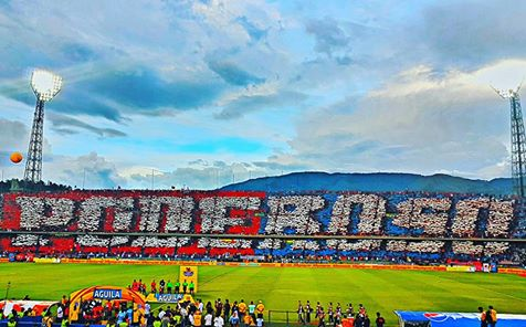 Hinchada del campeón, Independiente Medellin